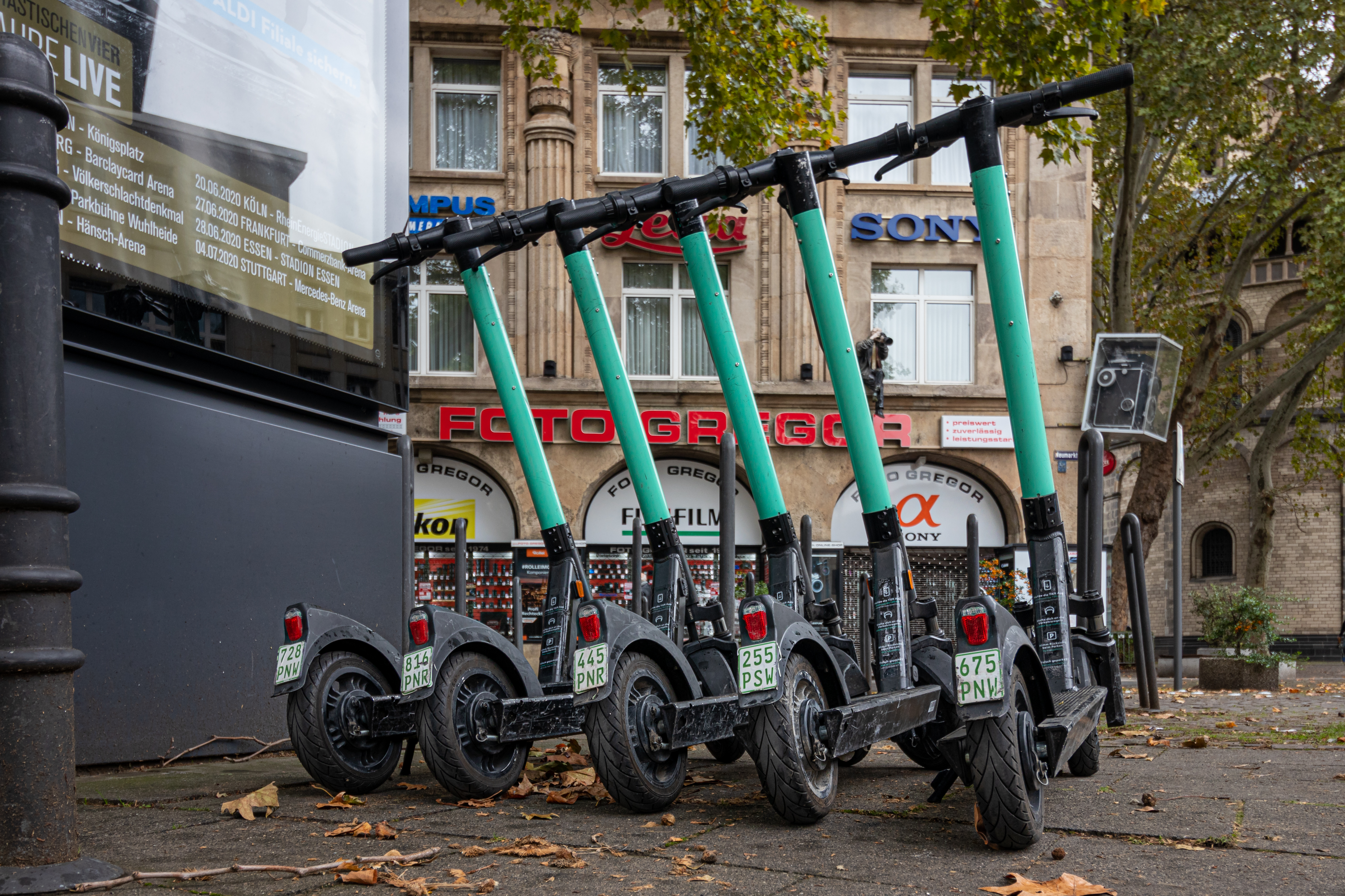 E-Scooter von Tier am Kölner Neumarkt